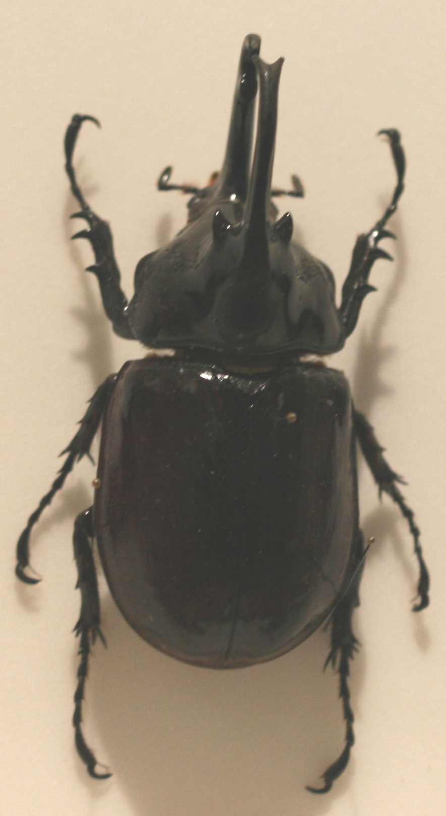 Aegosoma centaurus, adult